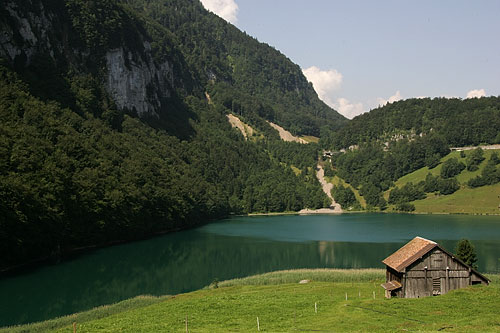 Seeli (Bergsee) in Seelisberg